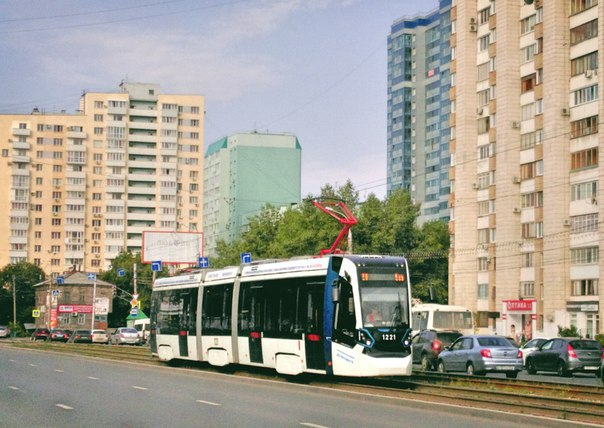 Трамвай "Метелица" на перекрестке проспекта Ленина и ул. Полевой